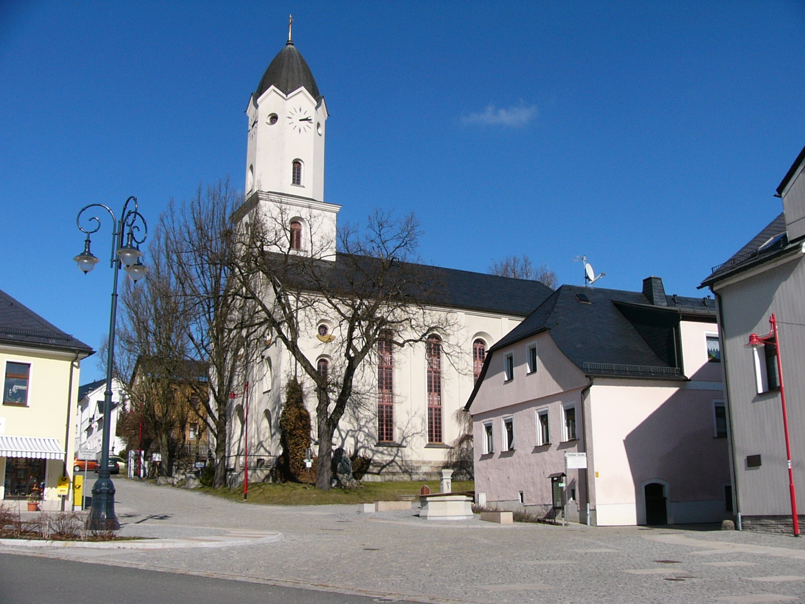 Kirche von Bad Brambach